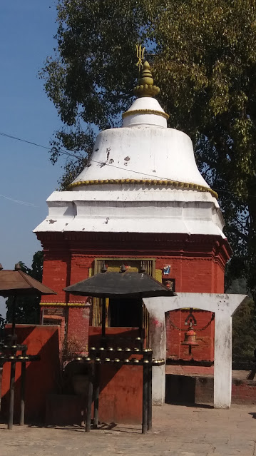 नेपाली: सुवर्णेश्वर महादेव, भक्तपुर